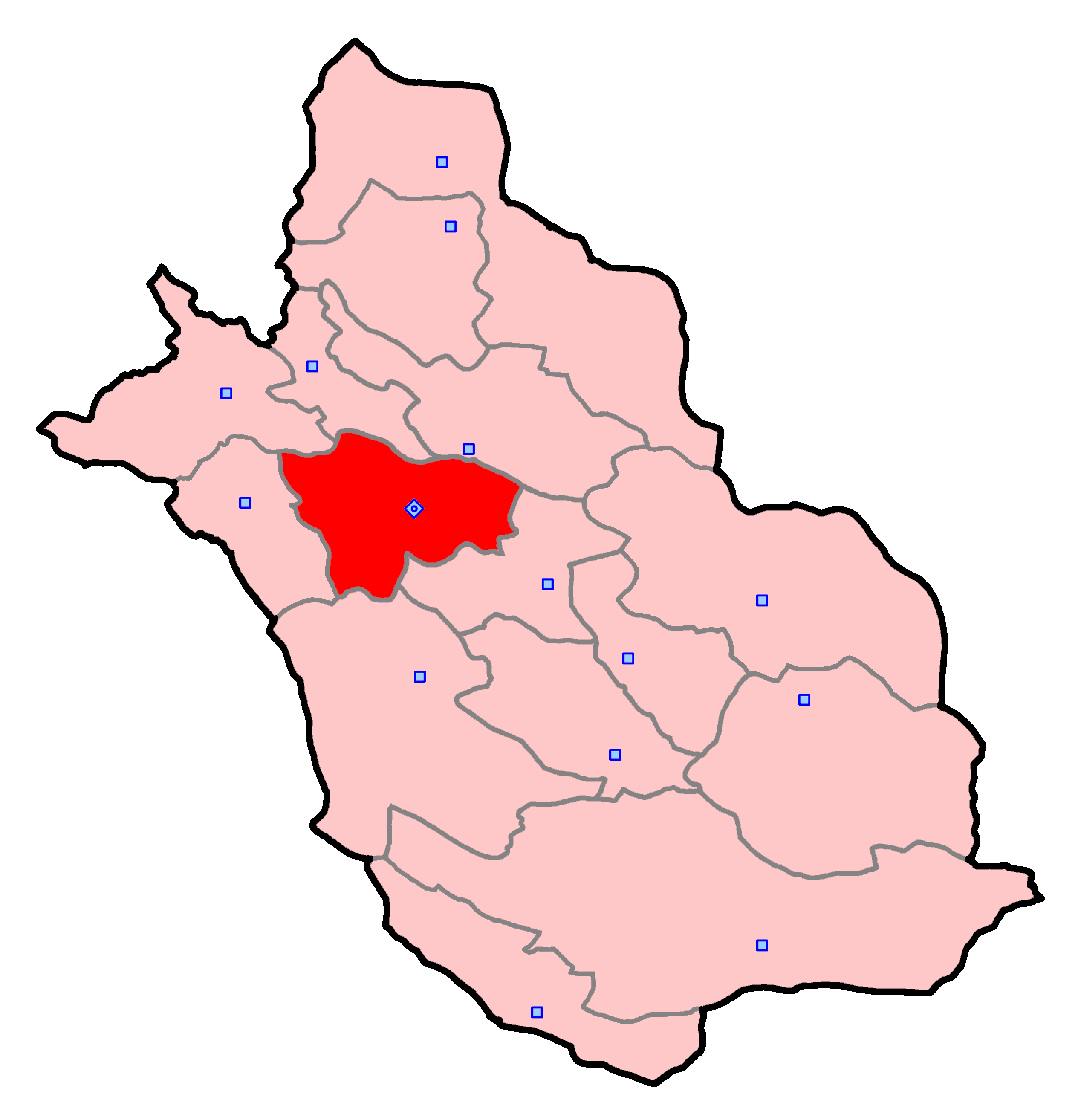 حوزهٔ انتخاباتی شیراز برای انتخابات مجلس شورای اسلامی